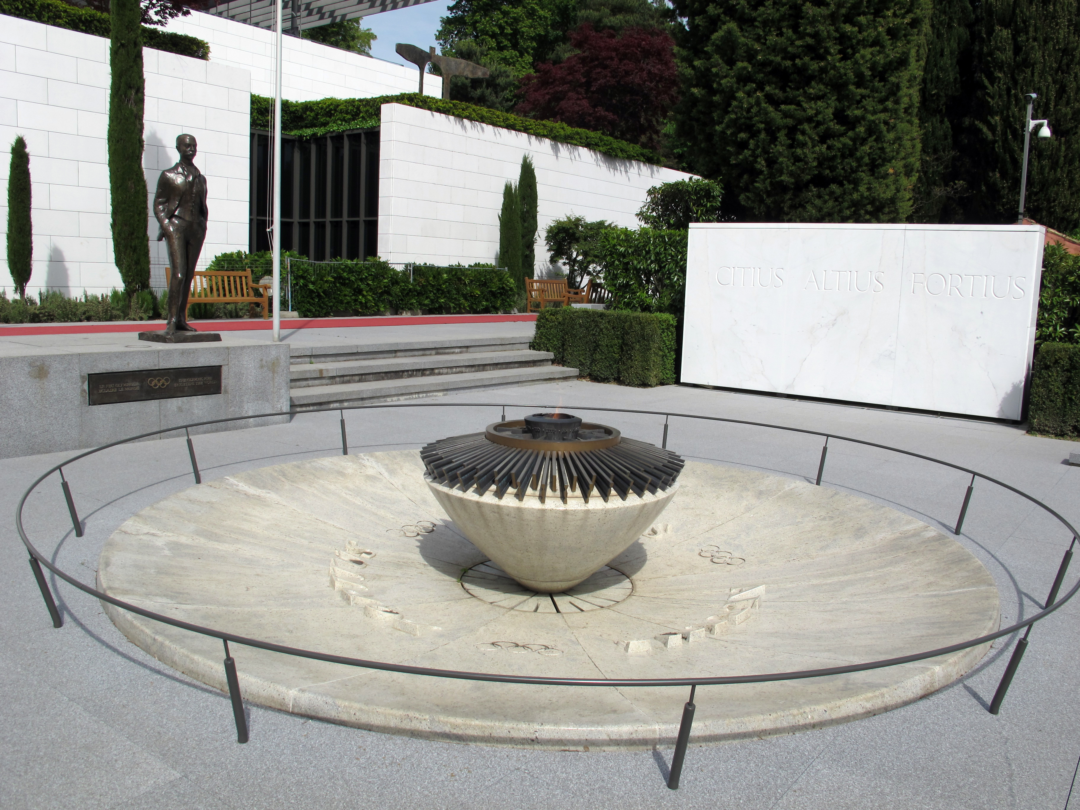 Musée Olympique, Losanna